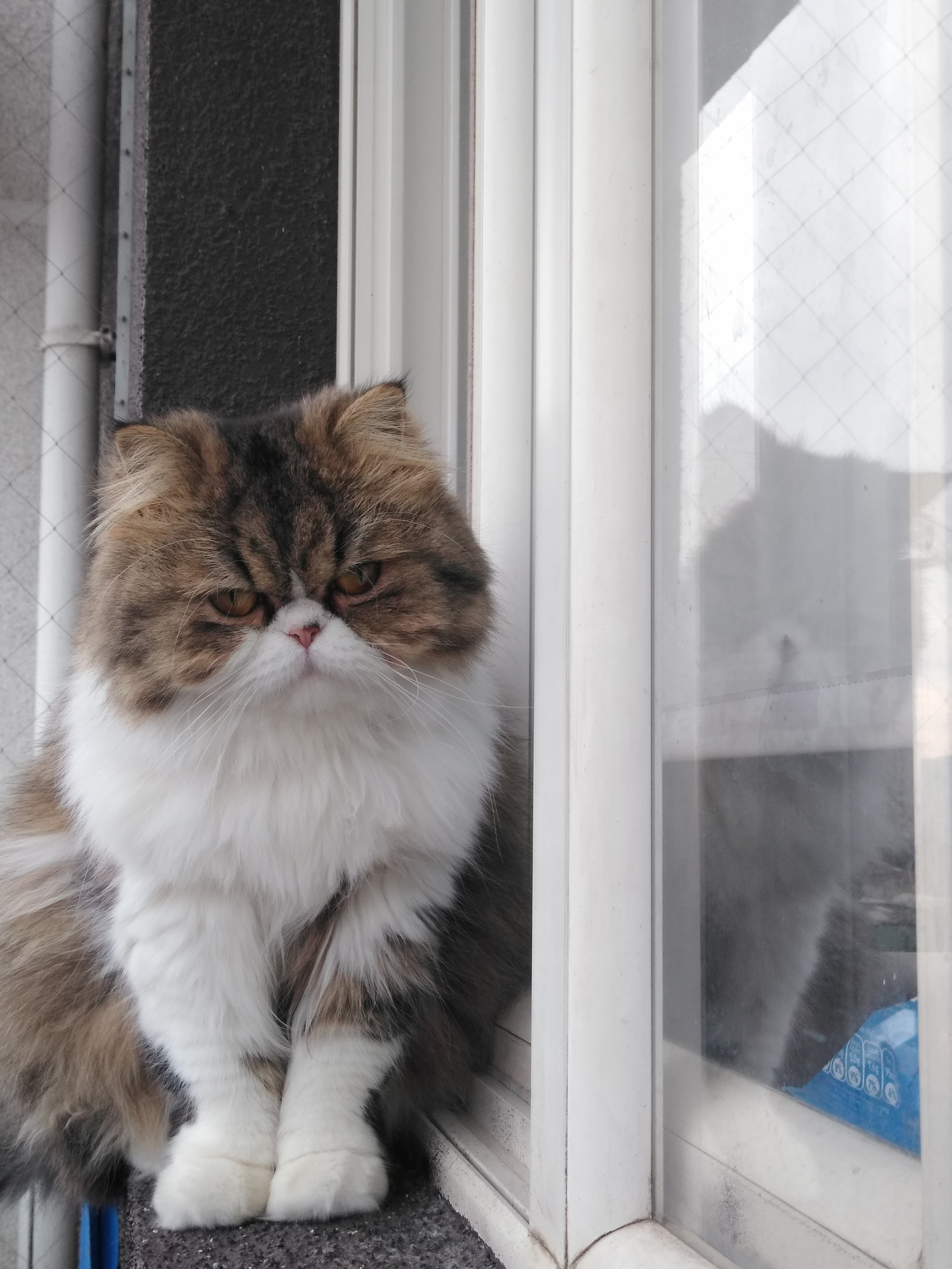 Una gata persa con pelaje de distintos colores, una caracterísitca común entre las hembras de la especie